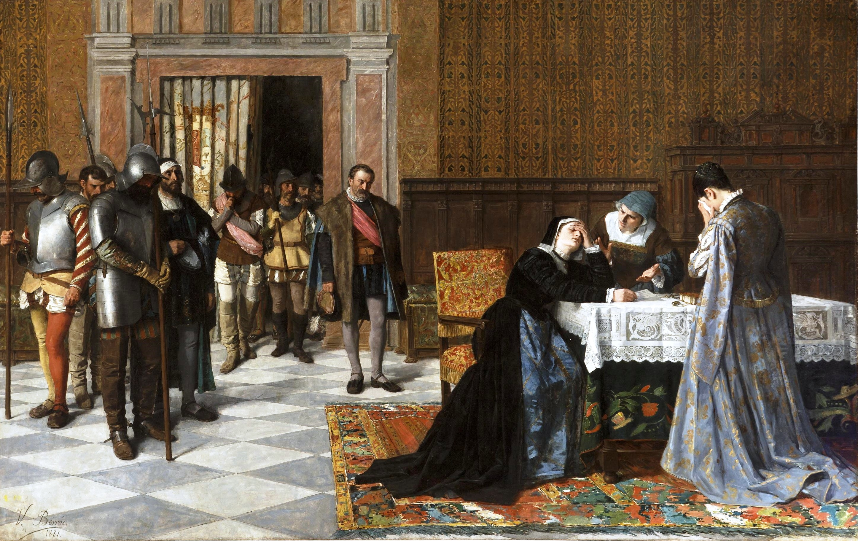 La obra representa a la dama castellana María Pacheco (1497-1531), que estuvo casada con el líder comunero Juan de Padilla, lamentándose tras la derrota de los Comuneros en Villalar y la ejecución de su esposo en el mencionado municipio vallisoletano junto a Juan Bravo y Francisco Maldonado.